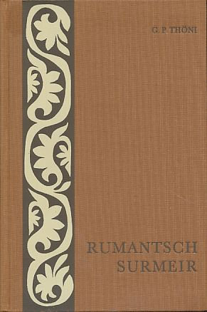 Lehrbuch in Surmeir für Deutschsprachige von Gion Peder Thöni (1969). Das Ornament auf dem Buchdeckel ist ein Motiv aus der romanischen Kirche St. Martin (Zillis) Rumantsch: Rumantsch-Surmeir. Grammatica per igl idiom surmiran. da Gion Peder Thöni. Igl ornamaint mossa en motiv or dalla baselgia romanica da Zirang